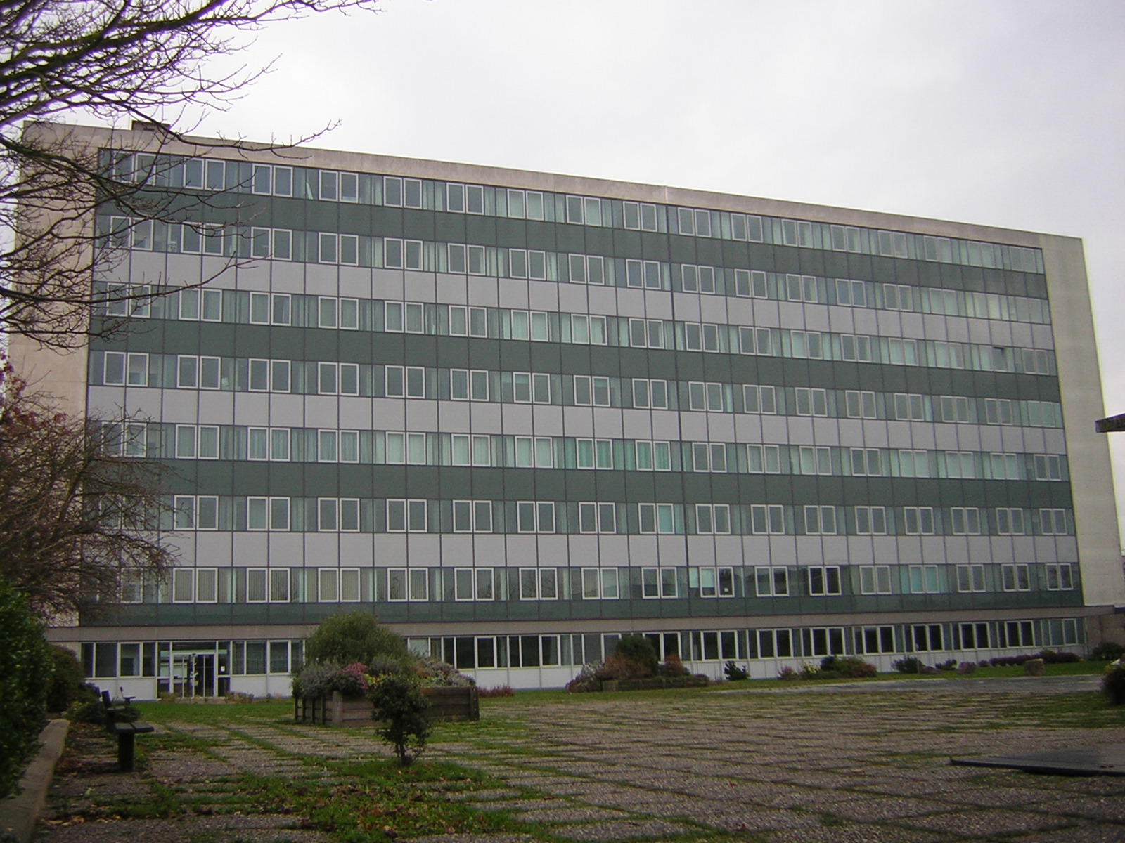 bâtiment principal de l'IUT du Havre (site Caucriauville).